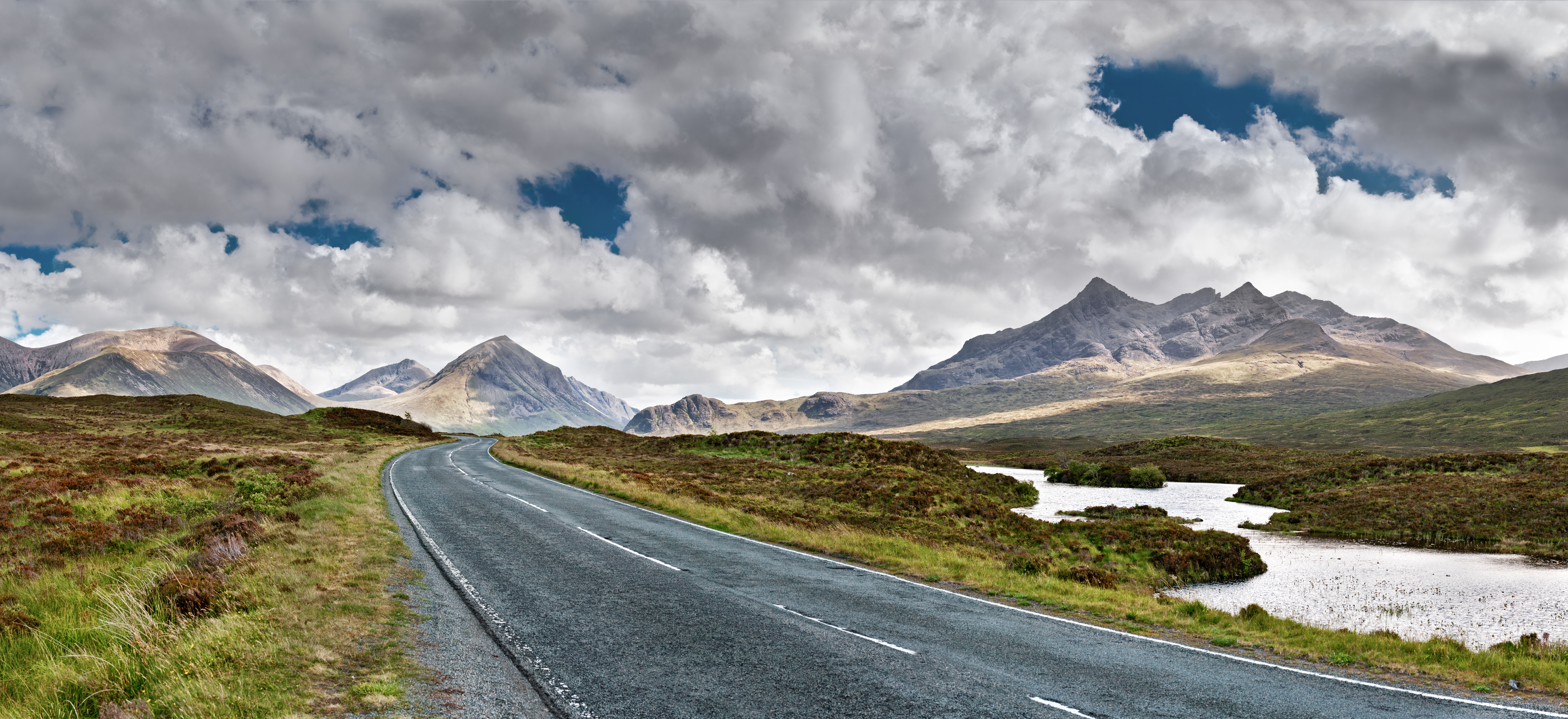 Blick auf die Cuillin Mountains von der A863 in Richtung Sligachan auf der Isle of Skye, Schottland.